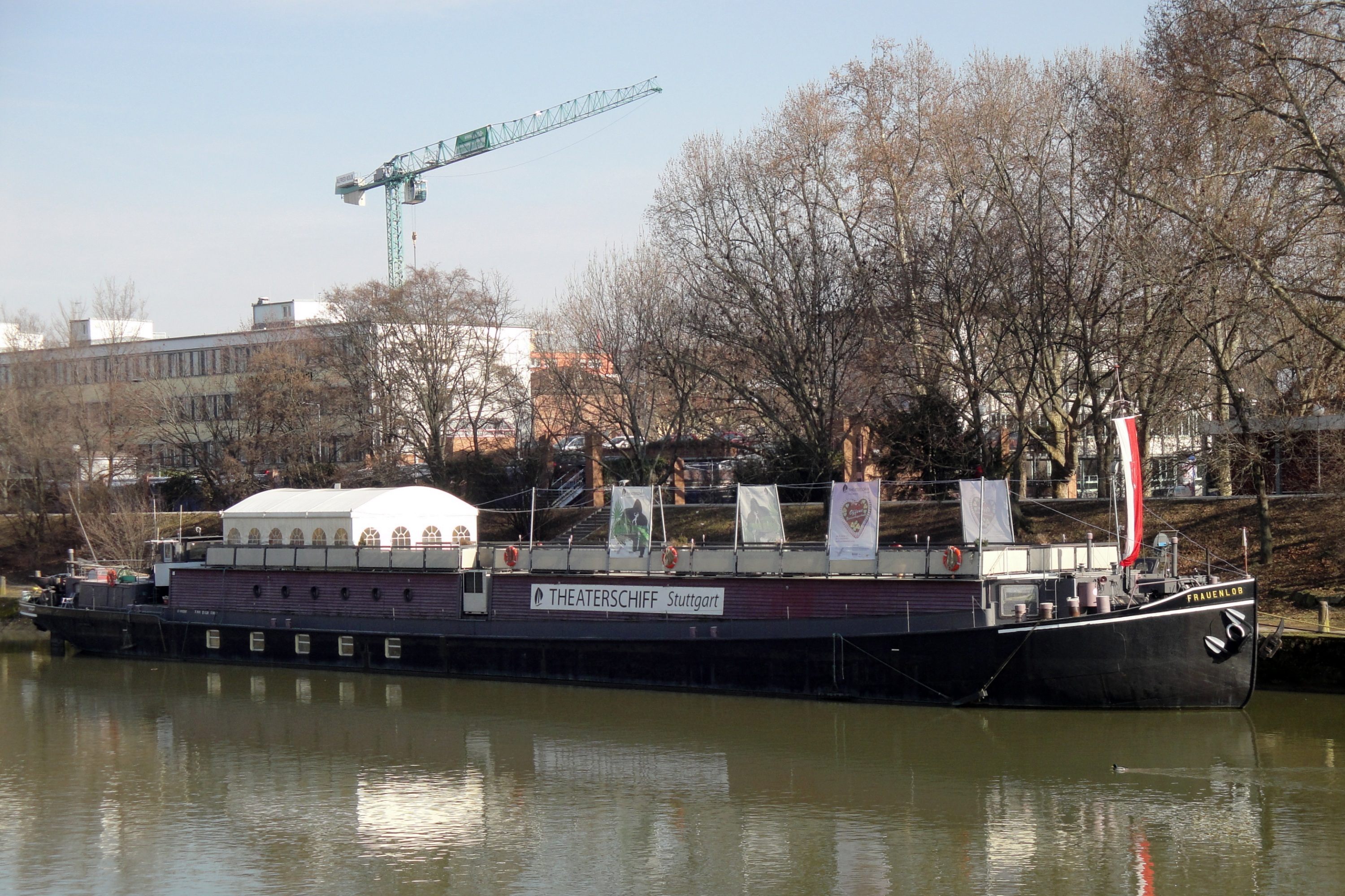 Theaterschiff Stuttgart auf dem Neckar in Stuttgat